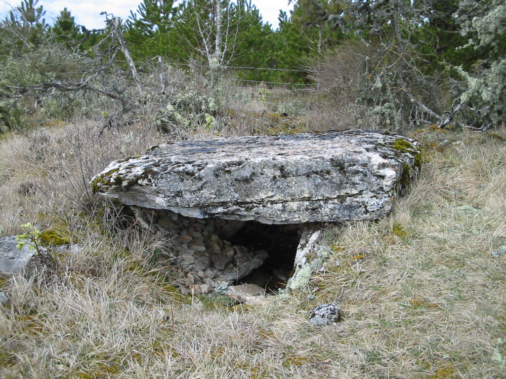 Dolmen simple de Bramonas, Causse de Sauveterre, Lozère, France Source : photo Bruno MARC Licence : GFDL Bruno MARC